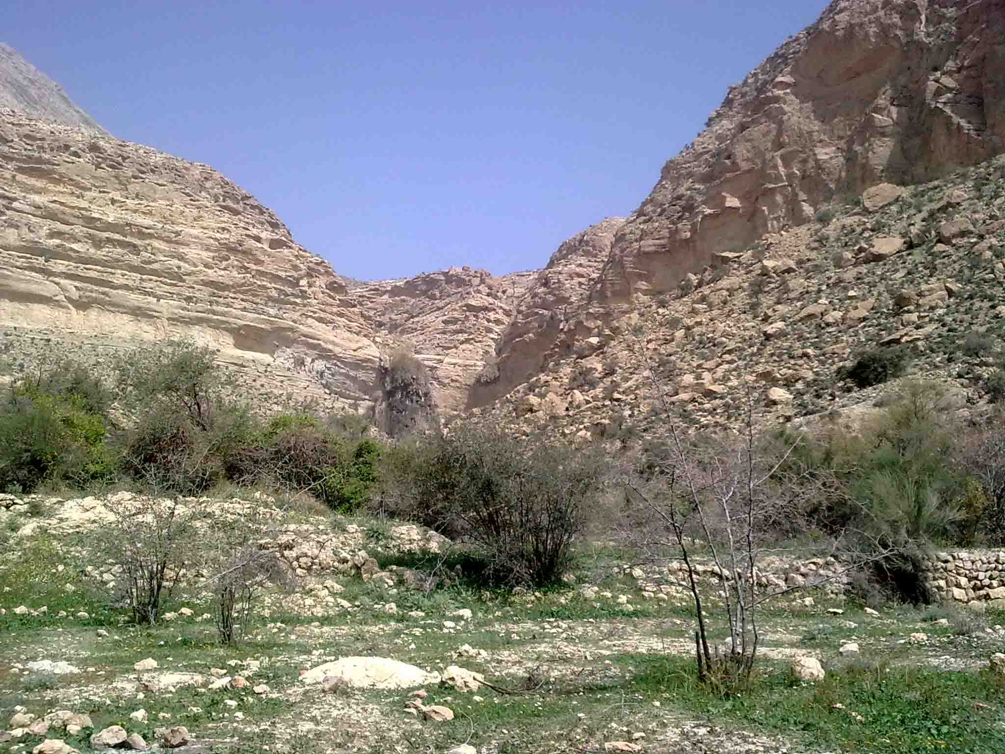 دورنمای منطقه تفریحی رحمت آباد